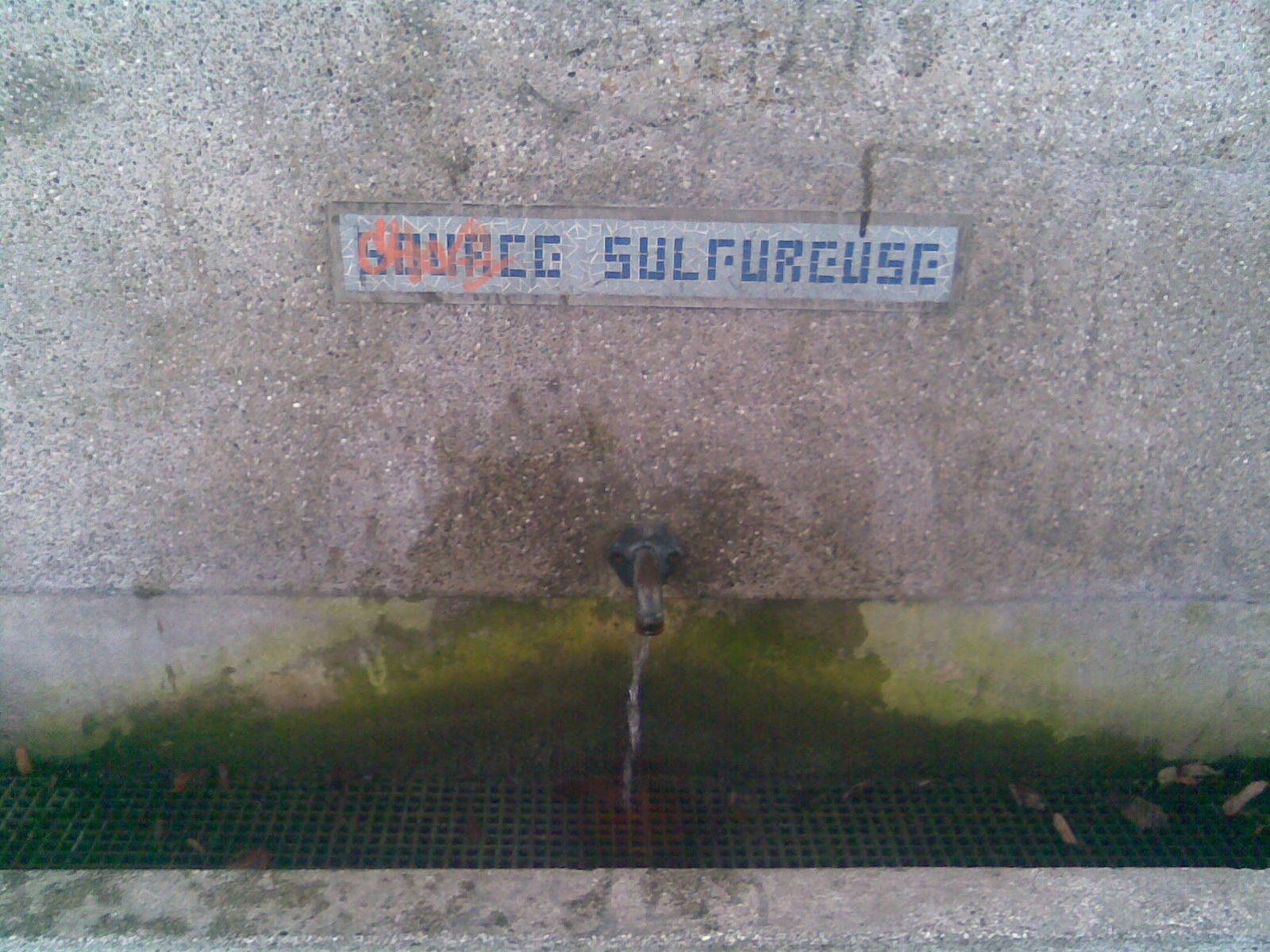 La source d'eau sulfureuse d'Amphion-les-bains, situé dans le parc Maxima.